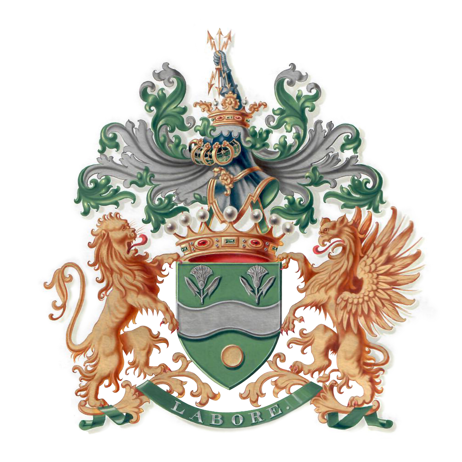 Armoiries Barons Empain